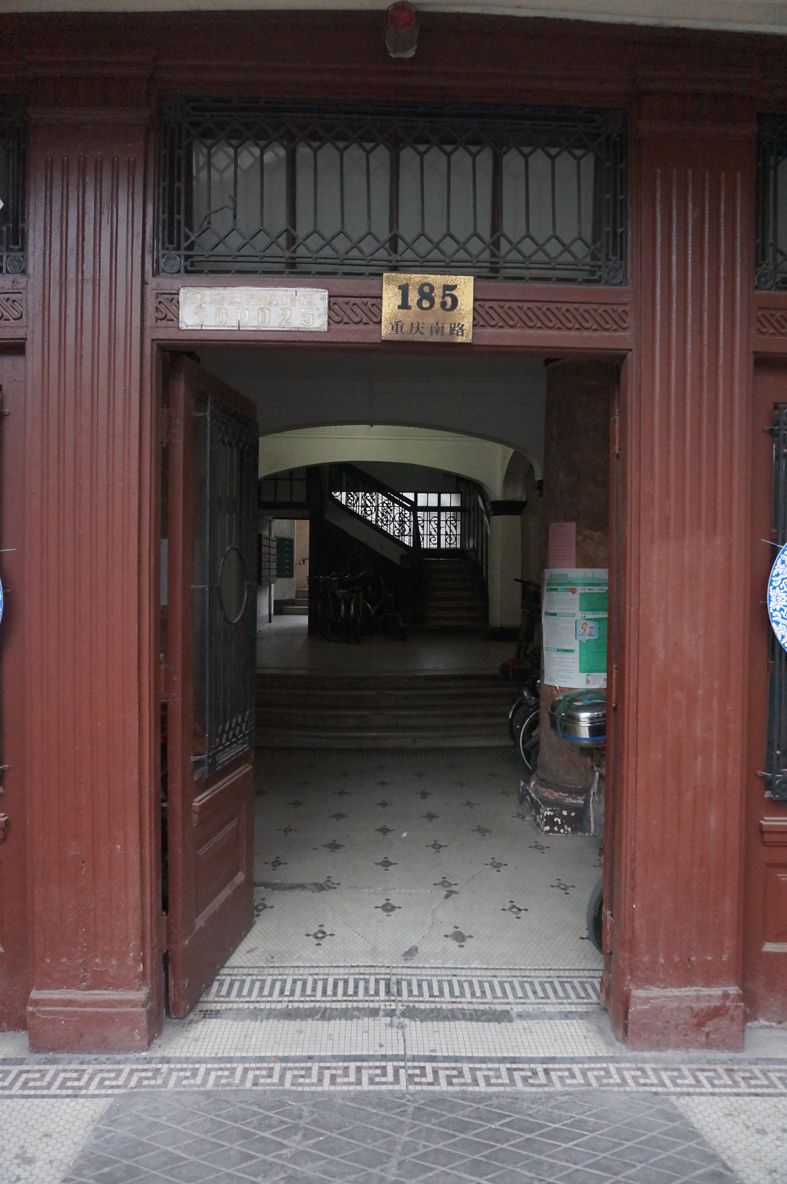 上海重庆公寓入口